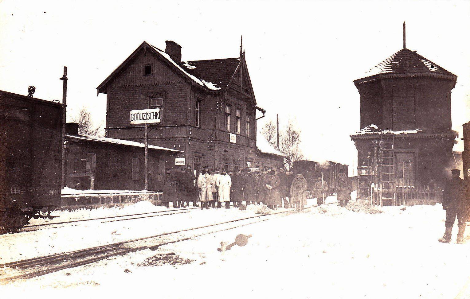 Беларуская (тарашкевіца): Гадуцішкі (Haduciški), вуліца Станцыйная (vulica Stancyjnaja). Чыгуначная станцыя